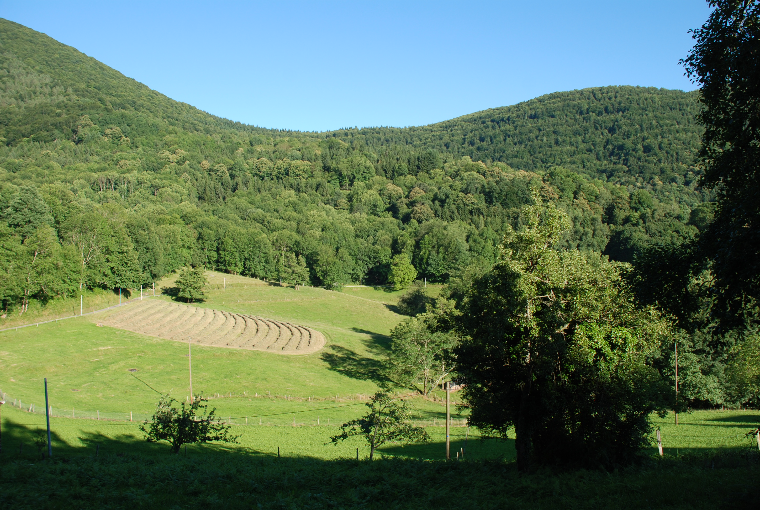 Paysage agricole et forestier depuis le Cap d'Erp, à Erp, Ariège